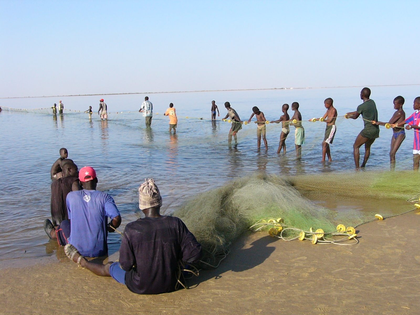 Gemeinschaftliches Fischen im senegalesischen Saloum-Delta.